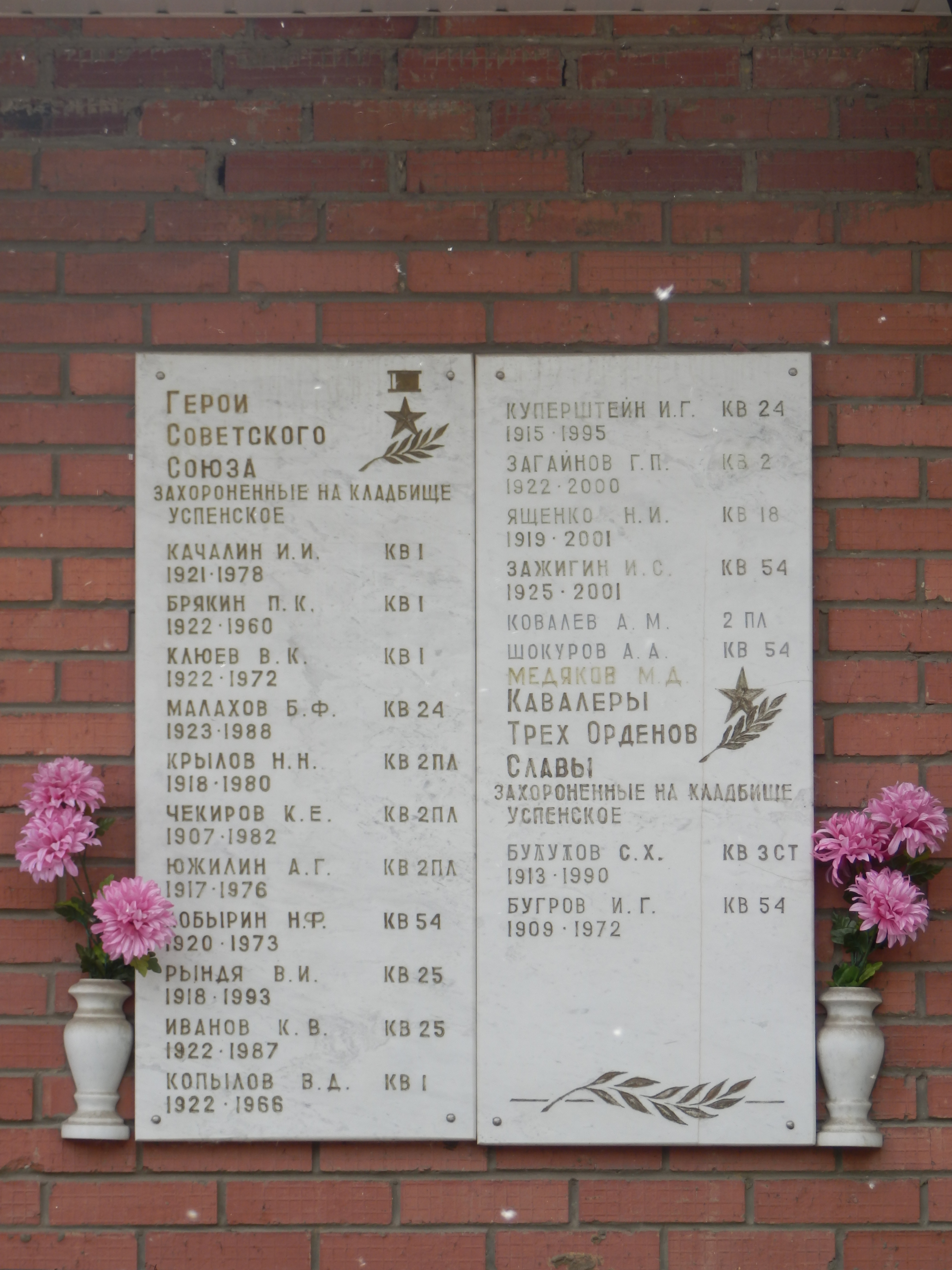 Список Героев Советского Союза и кавалеров трёх орденов Славы, захороненных на Успенском кладбище (Челябинск), с указанием кварталов, в которых находятся могилы